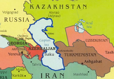 Carte de la mer Caspienne